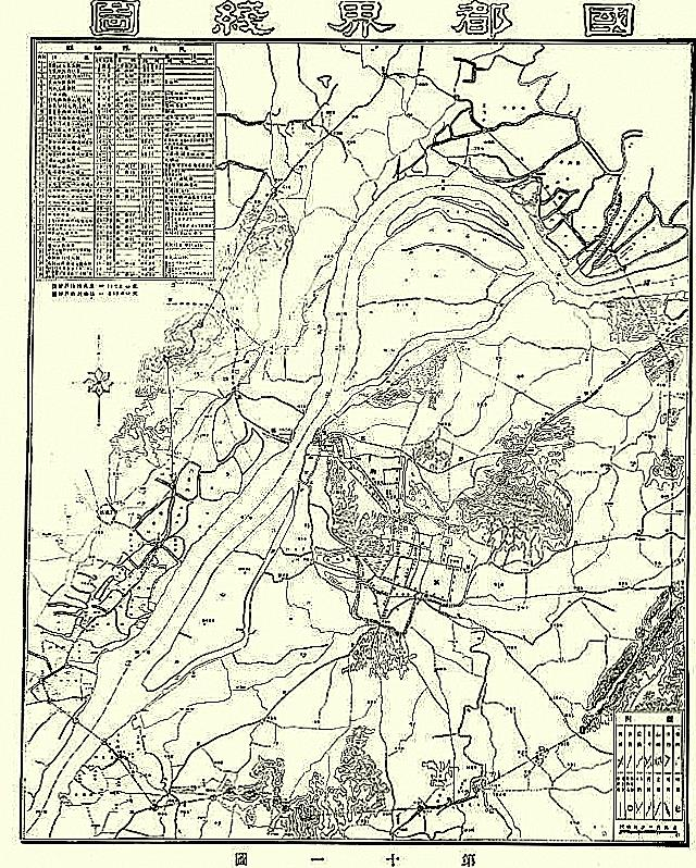 《首都计划》中的南京规划图